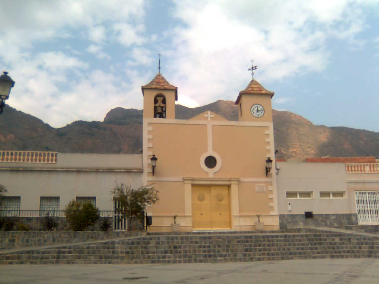 Iglesia parroquial del Rincón de Bonanza, Orihuela